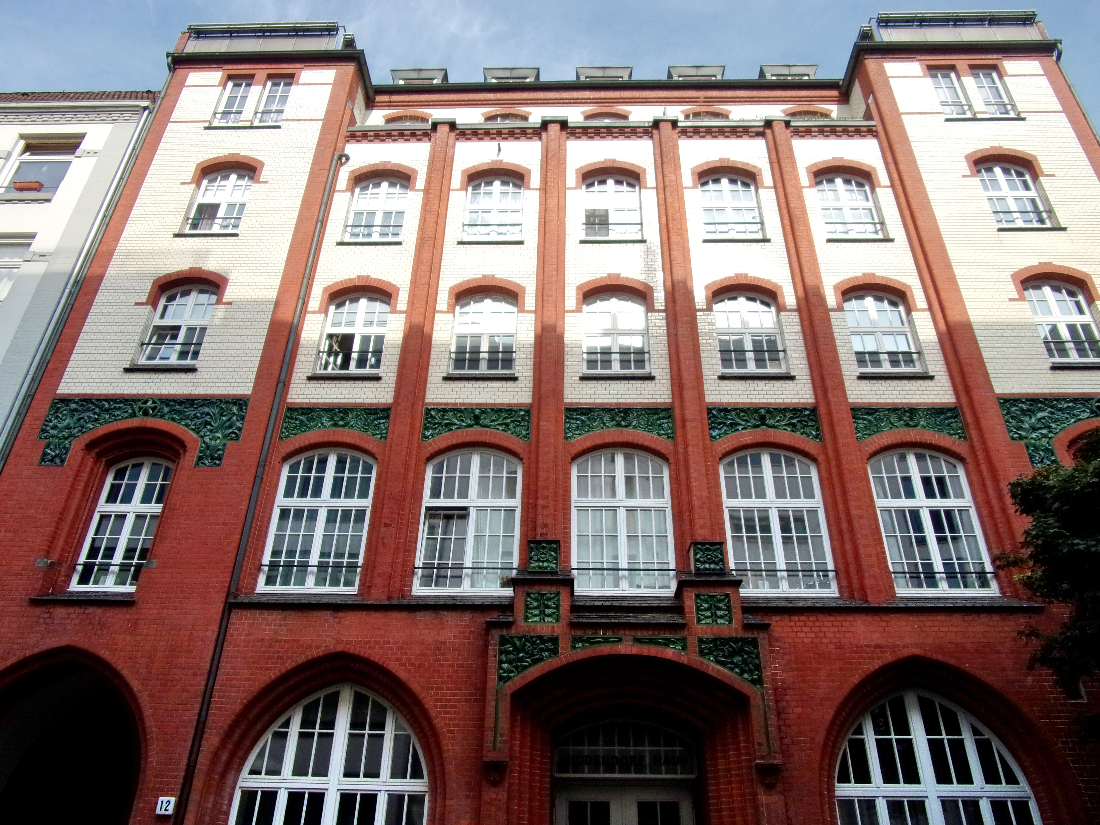 Wolfgangsweg 12, ehemaliges Seemannsheim. Das Gebäude wurde zwischen 1905-1906 erbaut. This is a photograph of an architectural monument.